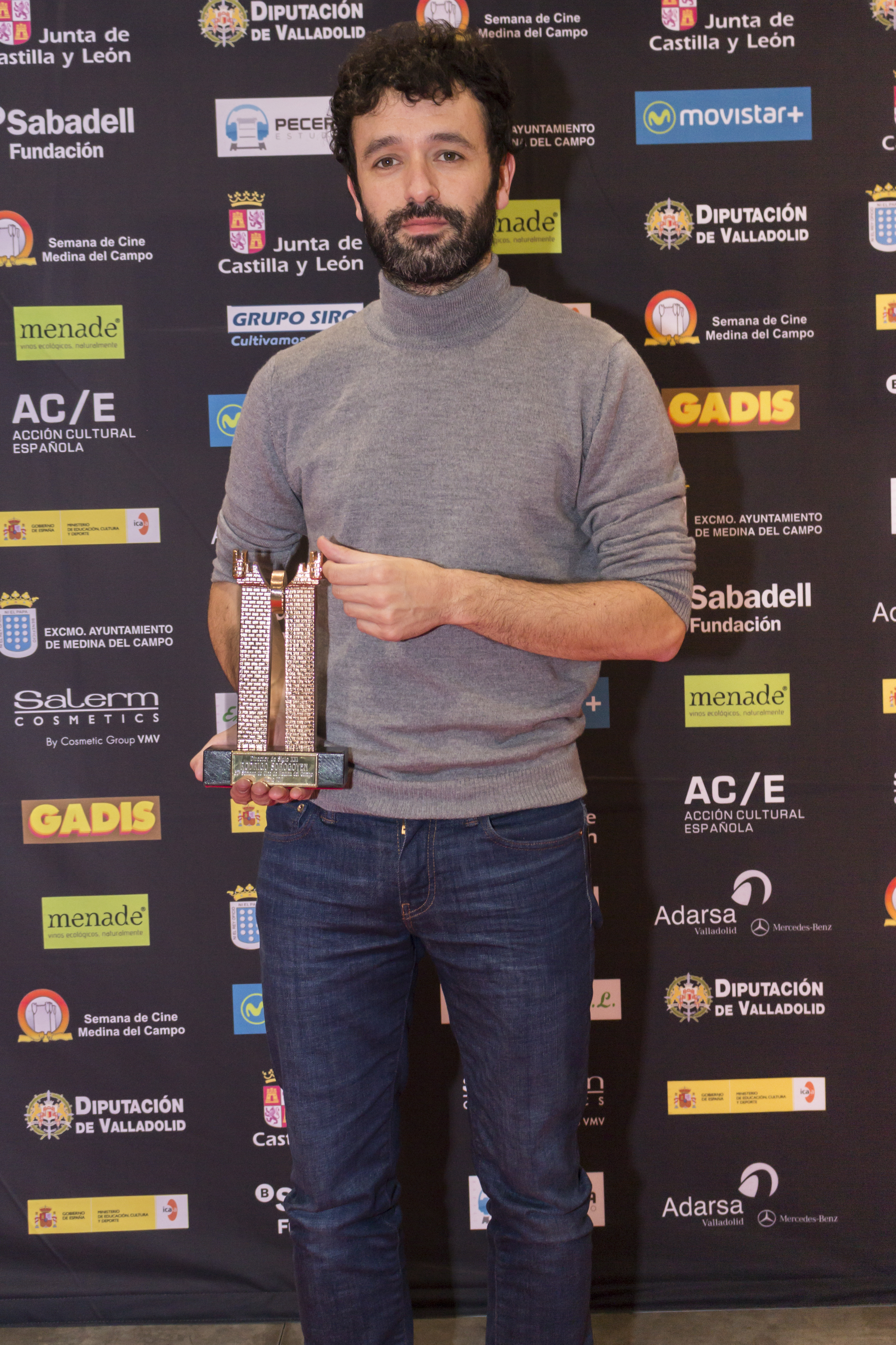 Rodrigo Sorogoyen en la 30 Semana de Cine de Medina del Campo, recogiendo el Roel de Director del S.XXI